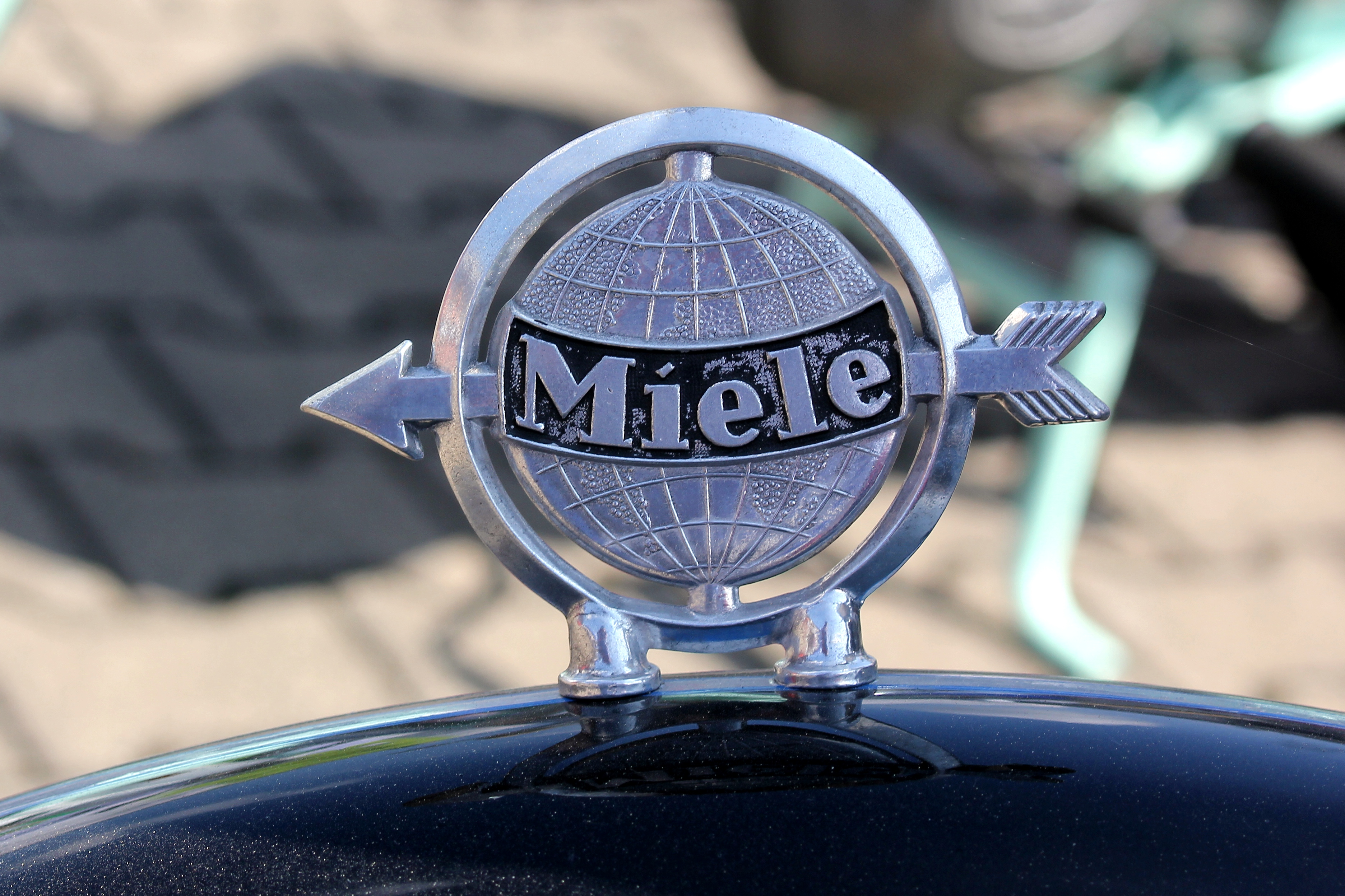 Logo auf einem Miele-Motorfahrrad K 21, Baujahr 1952